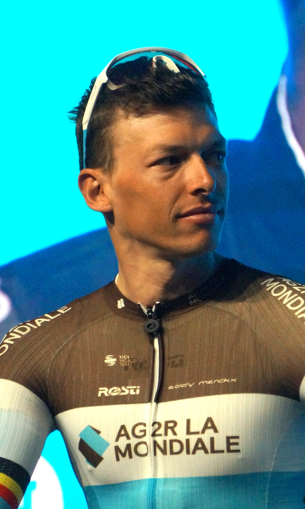 Oliver Naesen bij de ploegenvoorstelling in Gent voor de Omloop Het Nieuwsblad 2020